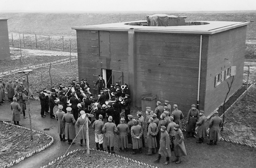 Einweihung der Flakbatterie Tabar in Wesermünde, im Hintergrund der Weserdeich.